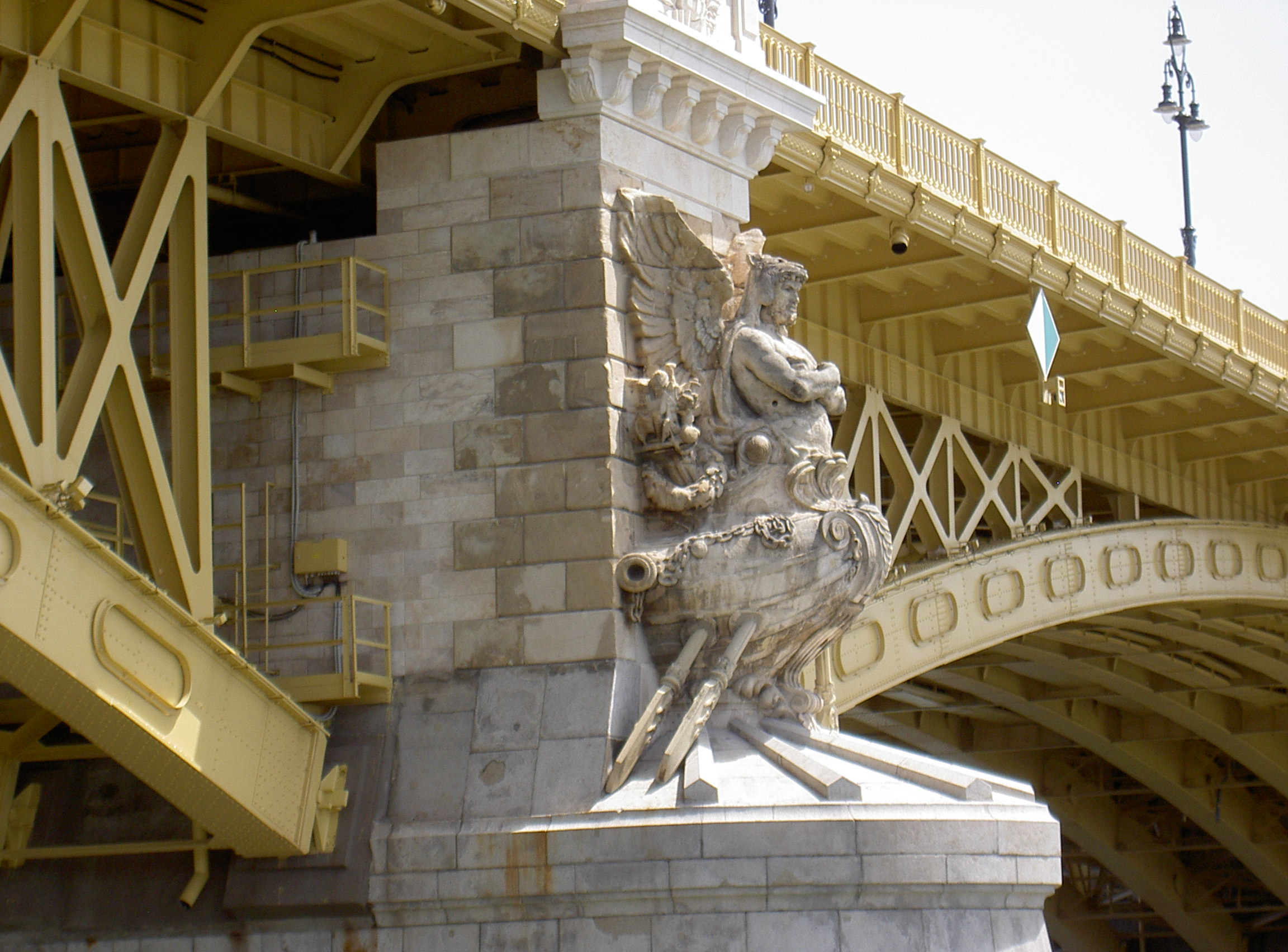 Budapest Figur an einem der Pfeiler der Margaretenbrücke